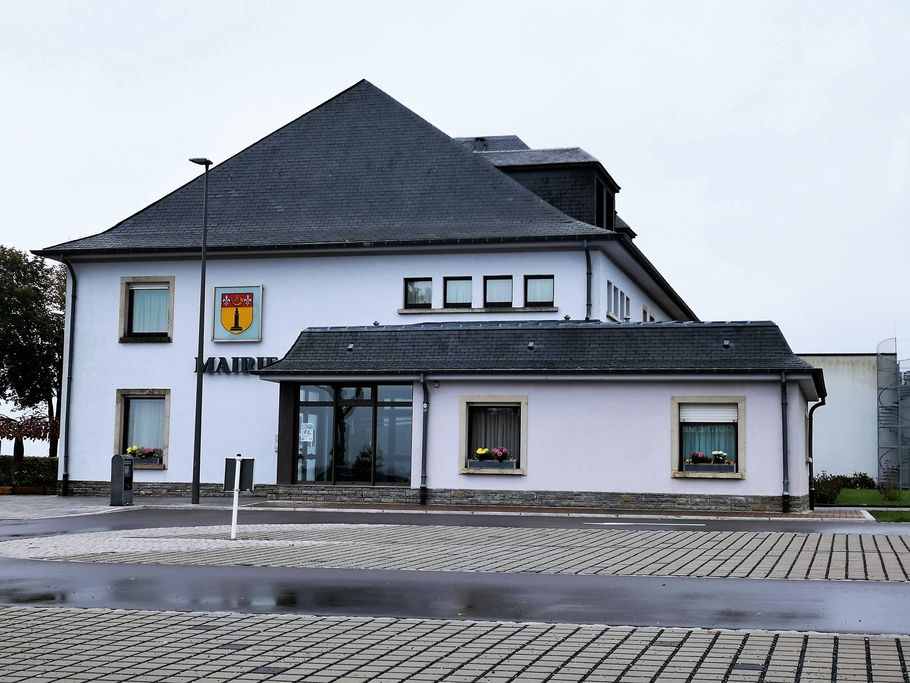 Wincrange, administration communale.